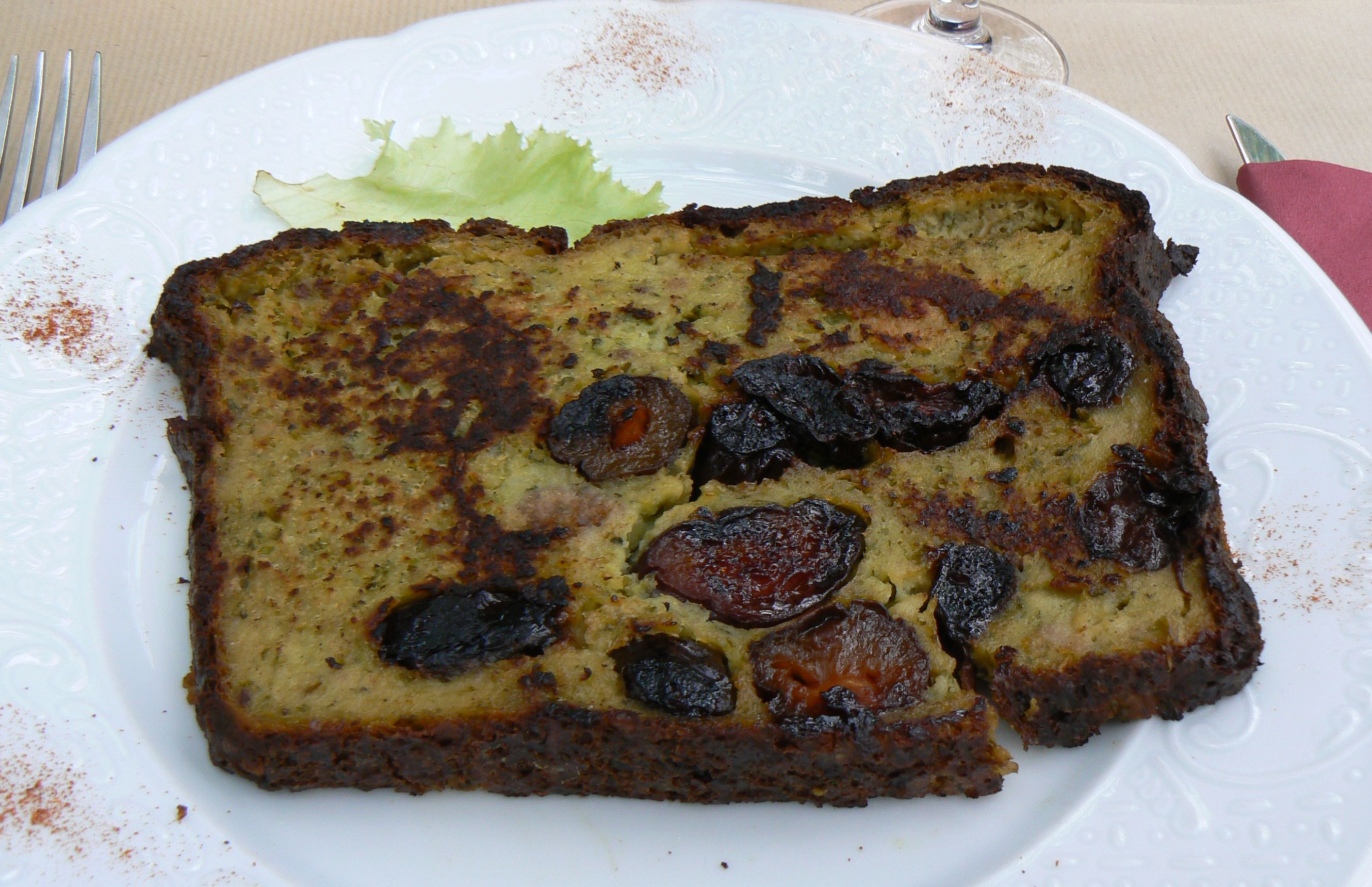 El pontin és un plat occità originari del massís de Cantal, però que també es menja al Llemosí; llenguadoc i altres zones d'Alvèrnia. Es tracta d'una mena de púding salat, amb un gust de pot recordar les croquetes, farcit de prunes seques.